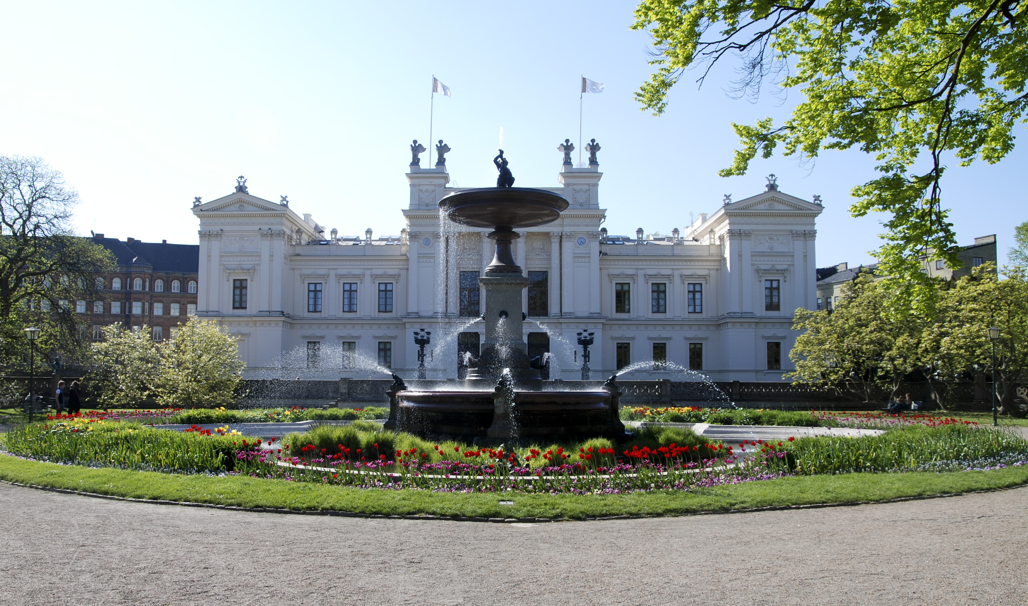 Universitetsbyggnaden, Lund